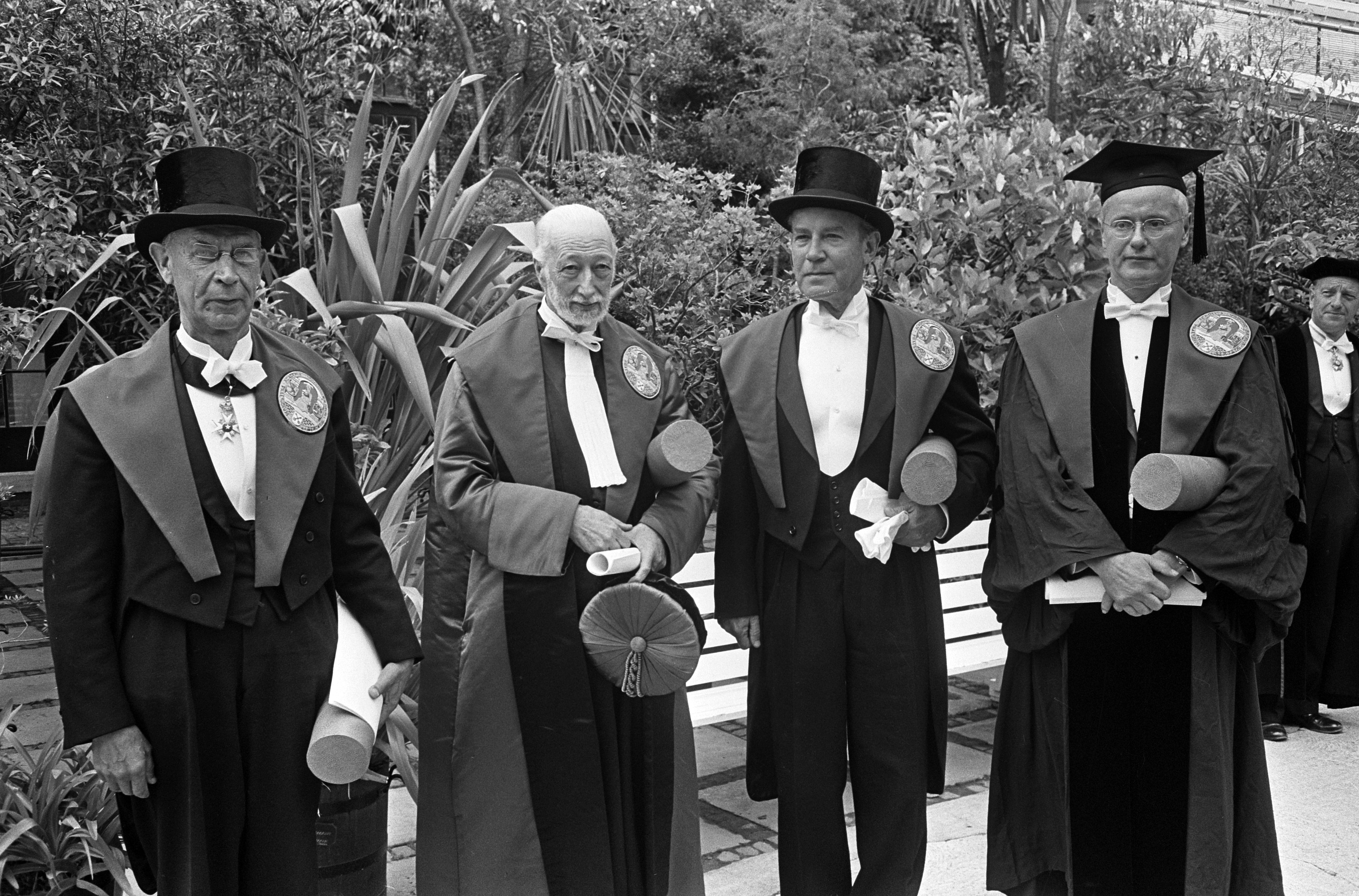 Eredoctoraten bij Leidse Universiteit uitgereikt, v.l.n.r. prof. dr. Ivar Waller , prof. dr. Antoine Giroud , de heer H. R. van Heekeren , prof. dr. R. K. Merton Datum 2 juli 1965